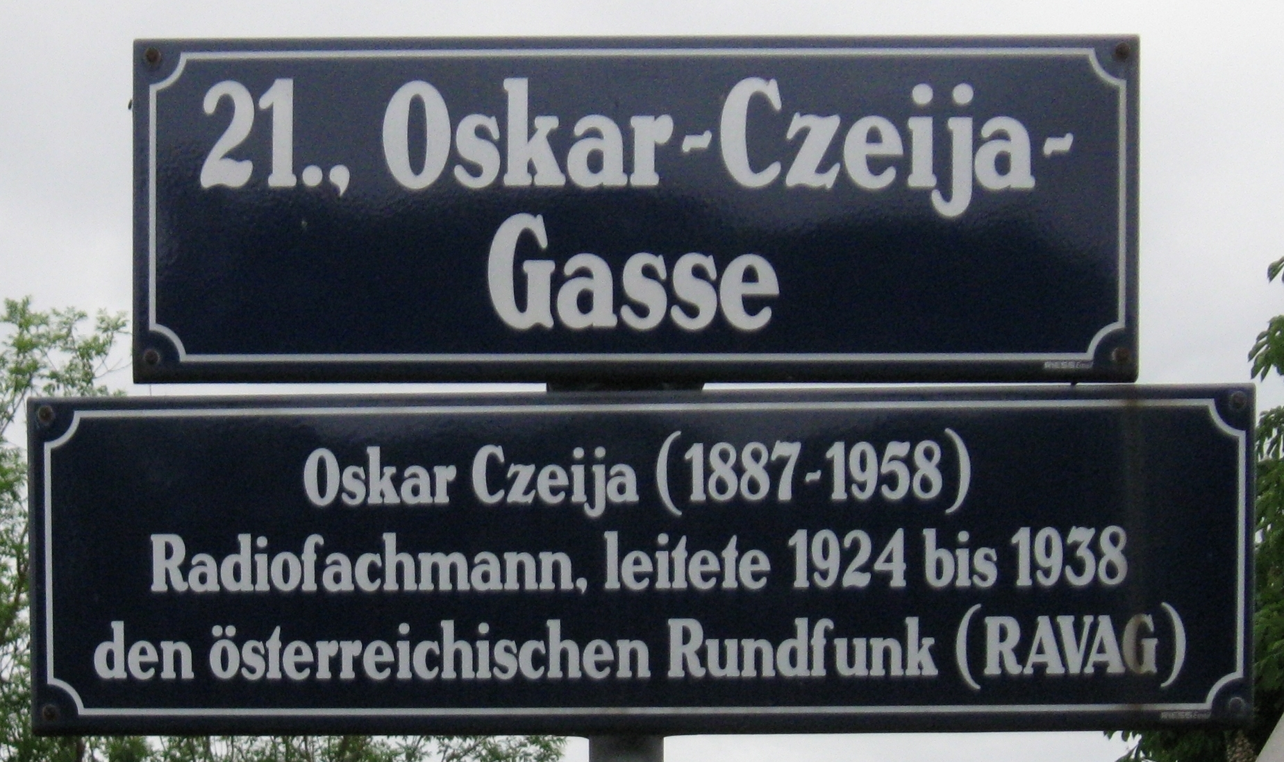 Straßentafel mit Namenserklärung für Oskar Czeija in Wien 21., Ecke Senderstraße 125/Oskar-Czeija-Gasse 2.